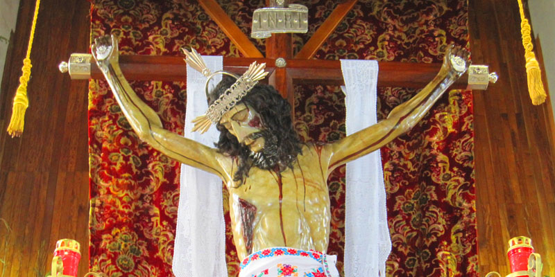 Cristo crucificado, de amplia veneración local. En opinión del investigador Enrique Rivas Paniagua, data de fines del siglo XVII o principios del XVIII, está realizado en pasta de caña de maíz, su peso aproximado es de 12 k (sin contar, desde luego, la cruz de madera) y probablemente se elaboró en el taller de esculturas de esta técnica que entonces había en la ciudad de México. Tiene la cabeza inclinada hacia la derecha, los ojos cerrados y la boca entreabierta; el beso de Judas está representado en su mejilla izquierda. Fue restaurado a finales del siglo XX y su acabado actual es brillante. Su estado de conservación es bueno. Se localiza en el altar mayor colateral